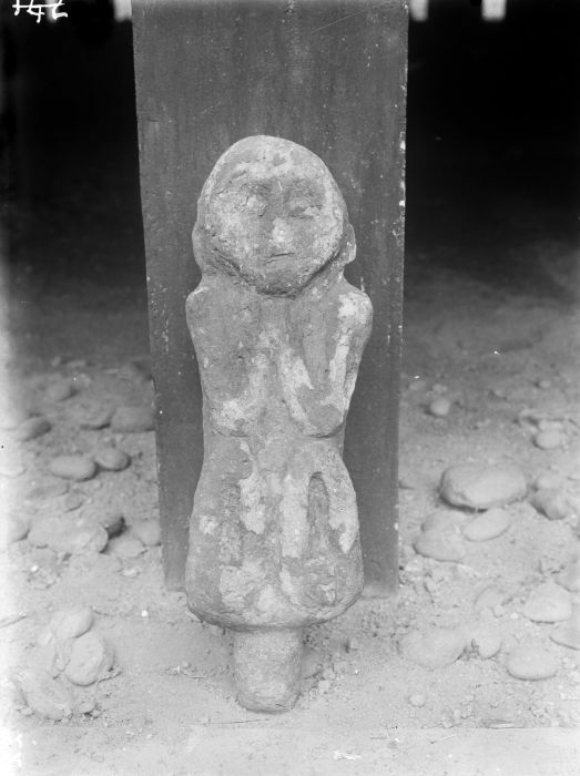 Negatief. Megalitisch beeld te Moearadoea Komering